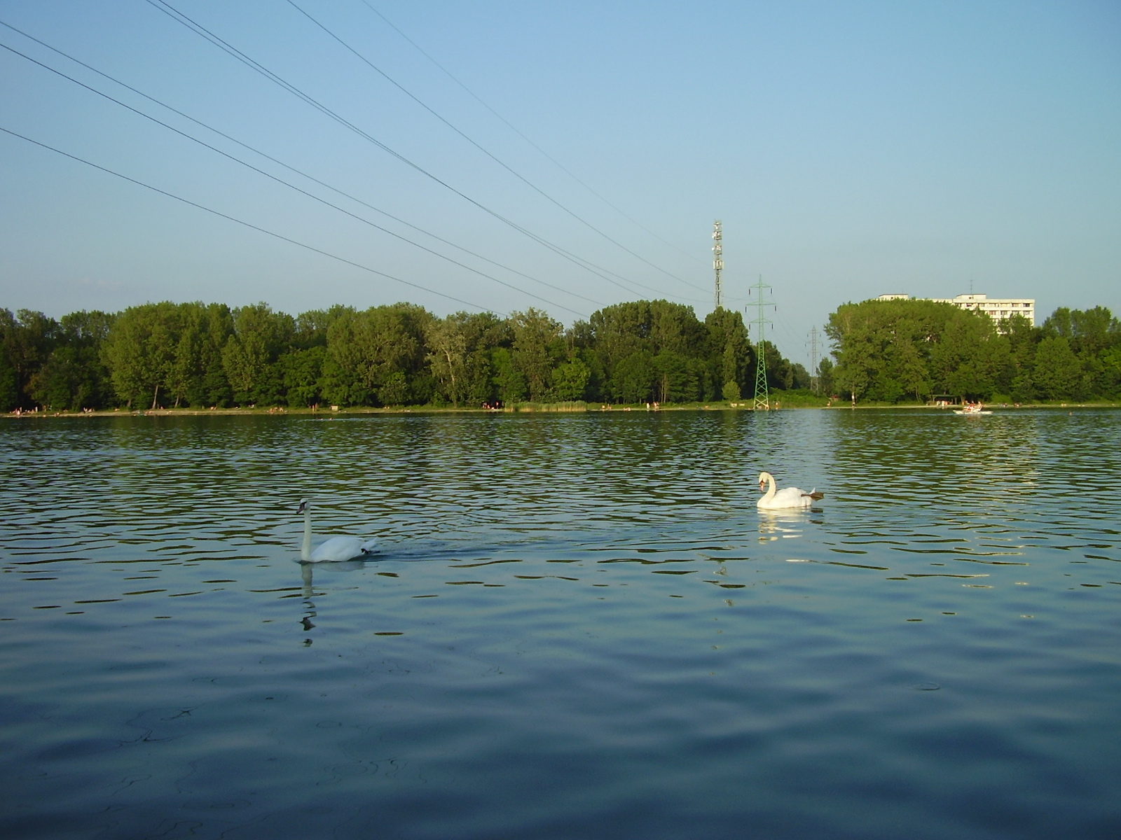 Veľký Draždiak.